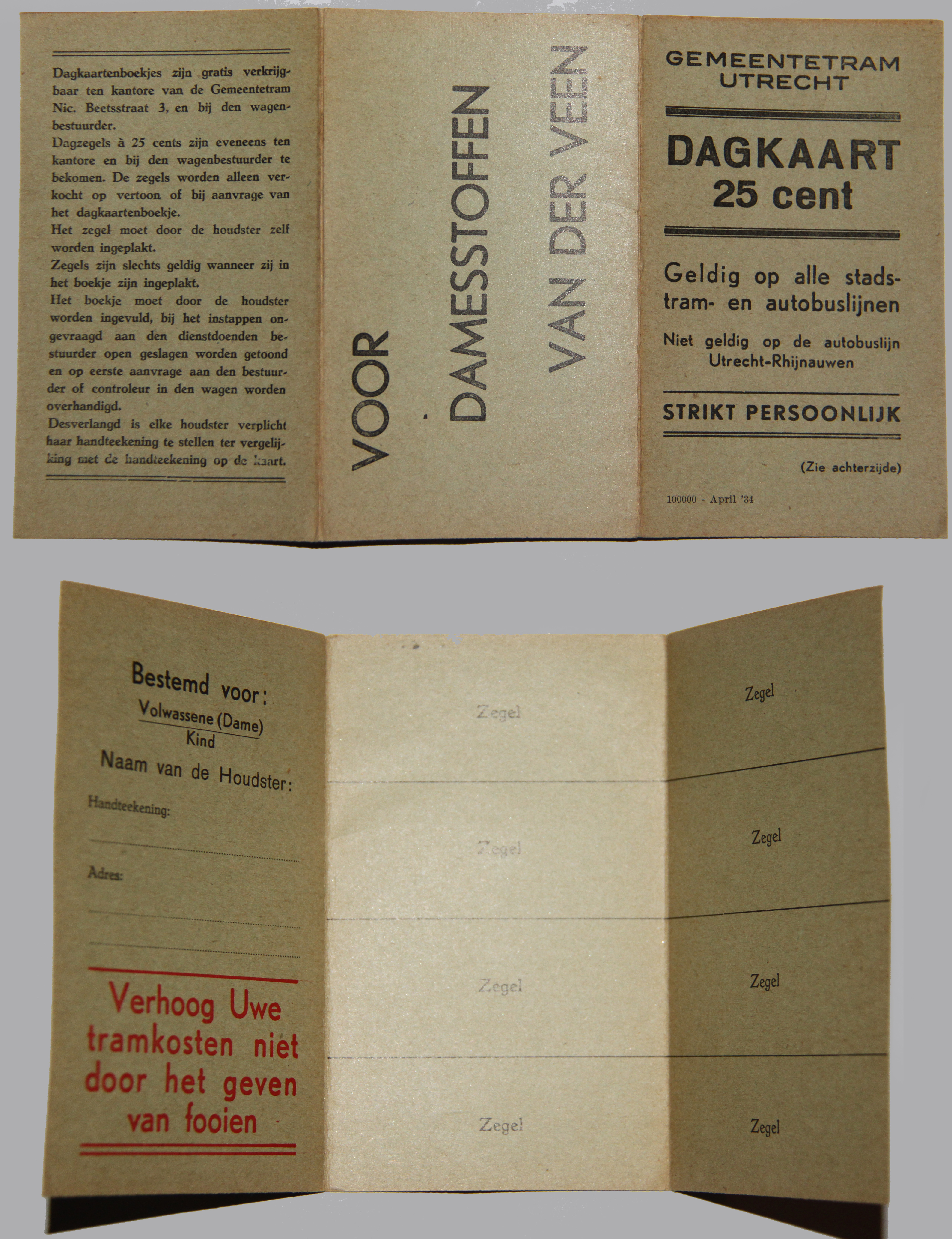 Voor- en achterzijde van een dagkaartenboekje van de gemeentetram Utrecht, uitgave april 1934. In elk geval van voor 1935 en derhalve is het gefotografeerde object, uitgegeven door een instantie, niet meer auteursrechtelijk beschermd.